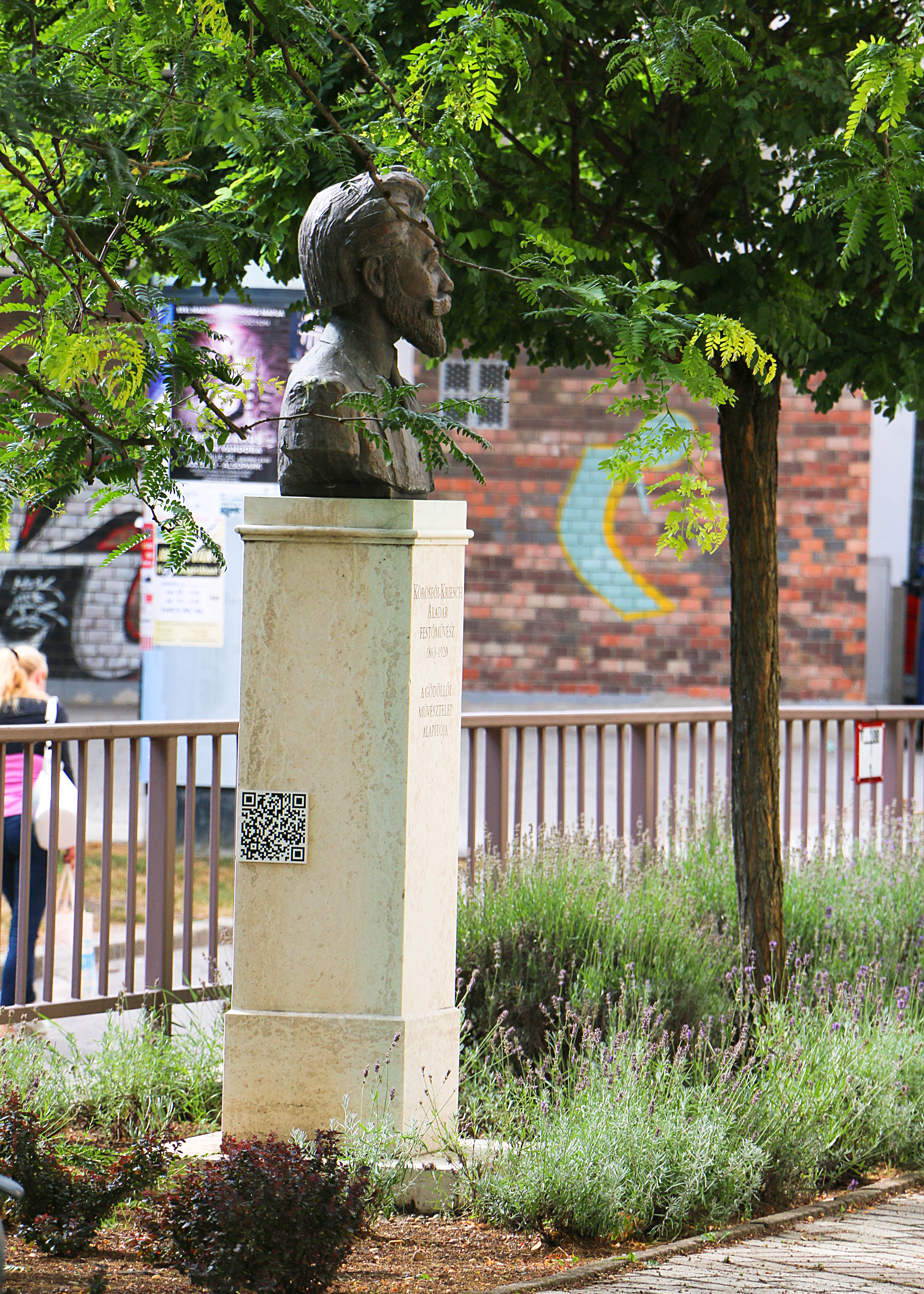 Körösfői-Kriesch Aladár bronz mellszobrát 2007-ben közadakozásból Gáti Gábor szobrászművész készíttette.